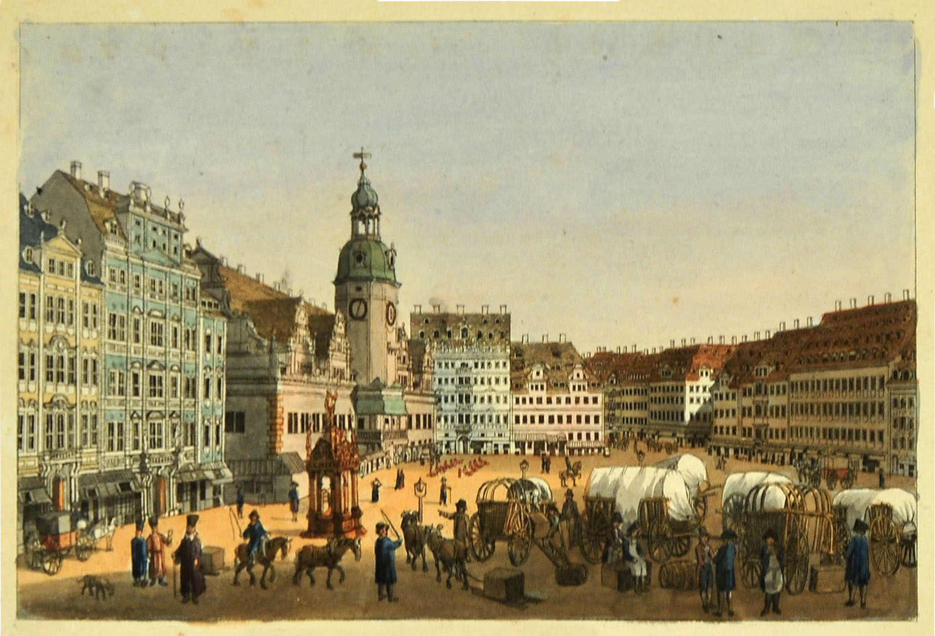 Leipzig: Der Markt aus der Catharinenssgtrasse Aquarellierter Kupferstich 15,5 x 21 cm (Plattenrand) aus: Schwarz, Karl Benjamin: Romantische Gemählde von Leipzig. Eine Folge von vier und zwanzig Prospecten gezeichnet und gestochen von Karl Benjamin Schwarz. Leipzig: Karl Tauchnitz 1804, 56 S. + 23 aquarellierte Kupfertafeln + 1 nicht kolorierter Stich. Carl Benjamin Schwarz: Vedutenstecher, Zeichner, Radierer, Farbstecher und Aquarellist (*1757 Leipzig, † 21.10.1813 ebenda). Schüler Oesers; Kustos an der Winklerschen Kunstsammlung (THIEME-BECKER Bd. 30, S. 365).